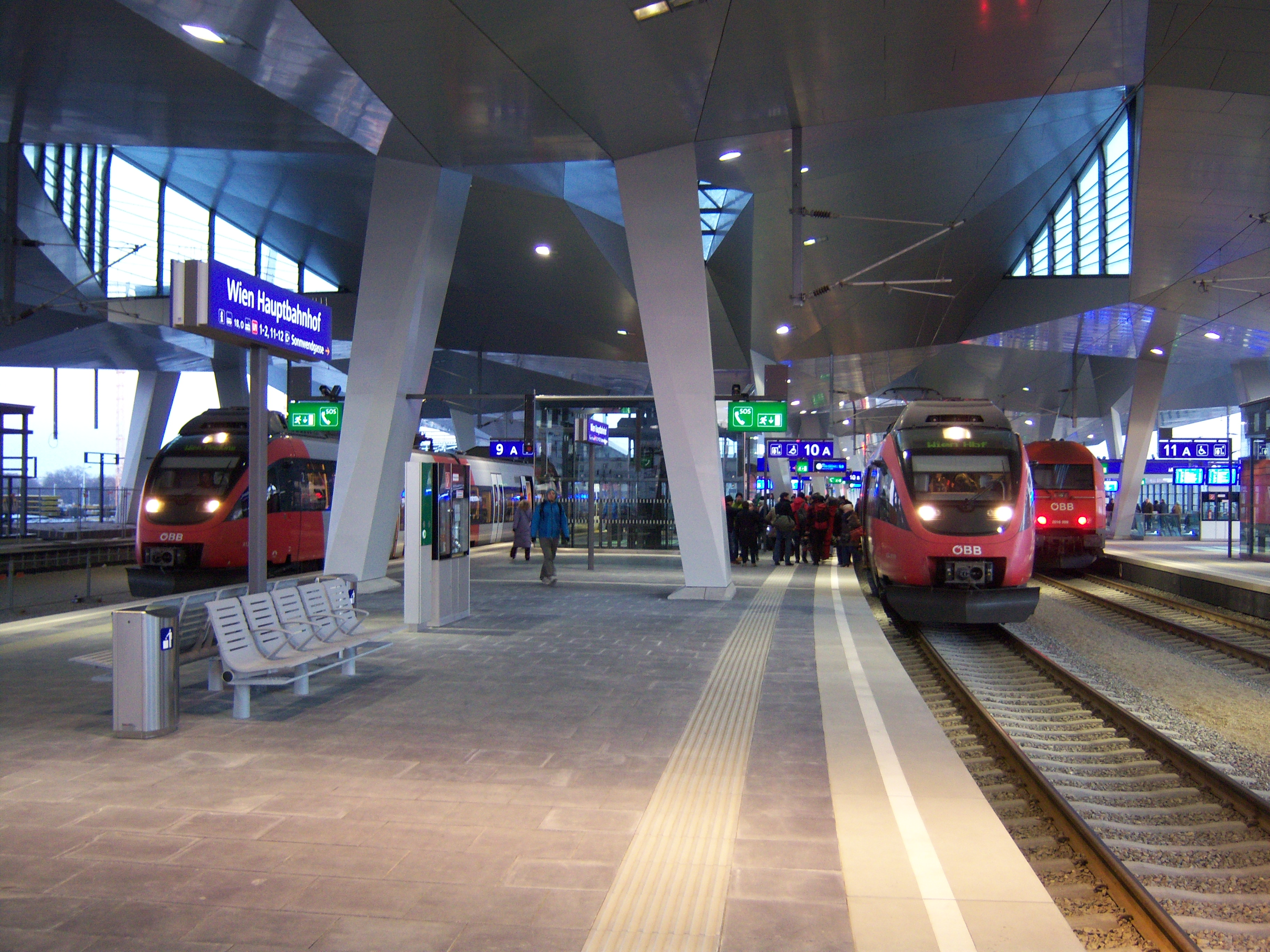 Der Wiener Hauptbahnhof am ersten Tag der Teilinbetriebnahme: Links auf Bahnsteig 9 steht ein Zug der Linie S80 von Hirschstetten nach Wien Meidling, Mittig auf Bahnsteig 10 ein Regionalzug nach Wulkaprodersdorf, Rechts auf Bahnsteig 9 ein Regionalzug nach Bratislava über Marchegg